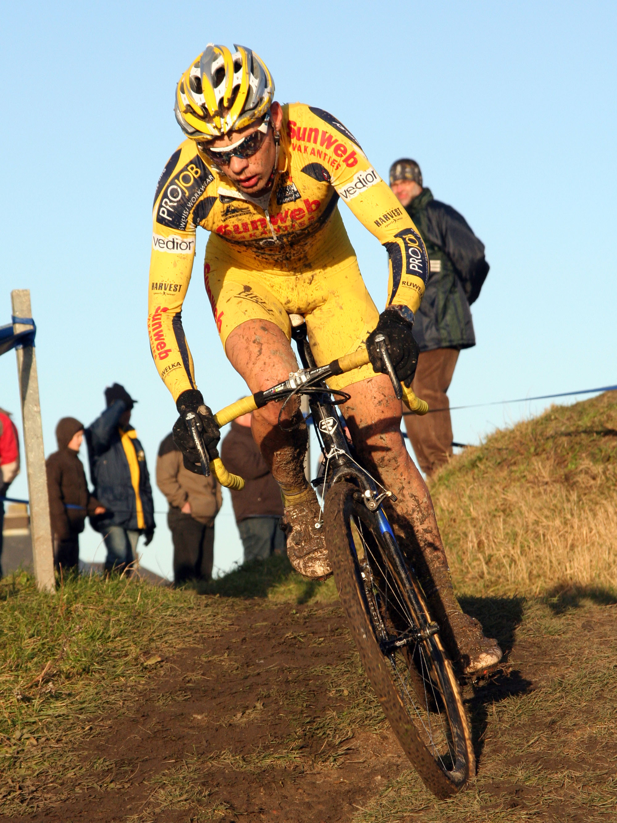 Sven Vanthournhout tijdens de Noordzeecross 2007 in Middelkerke